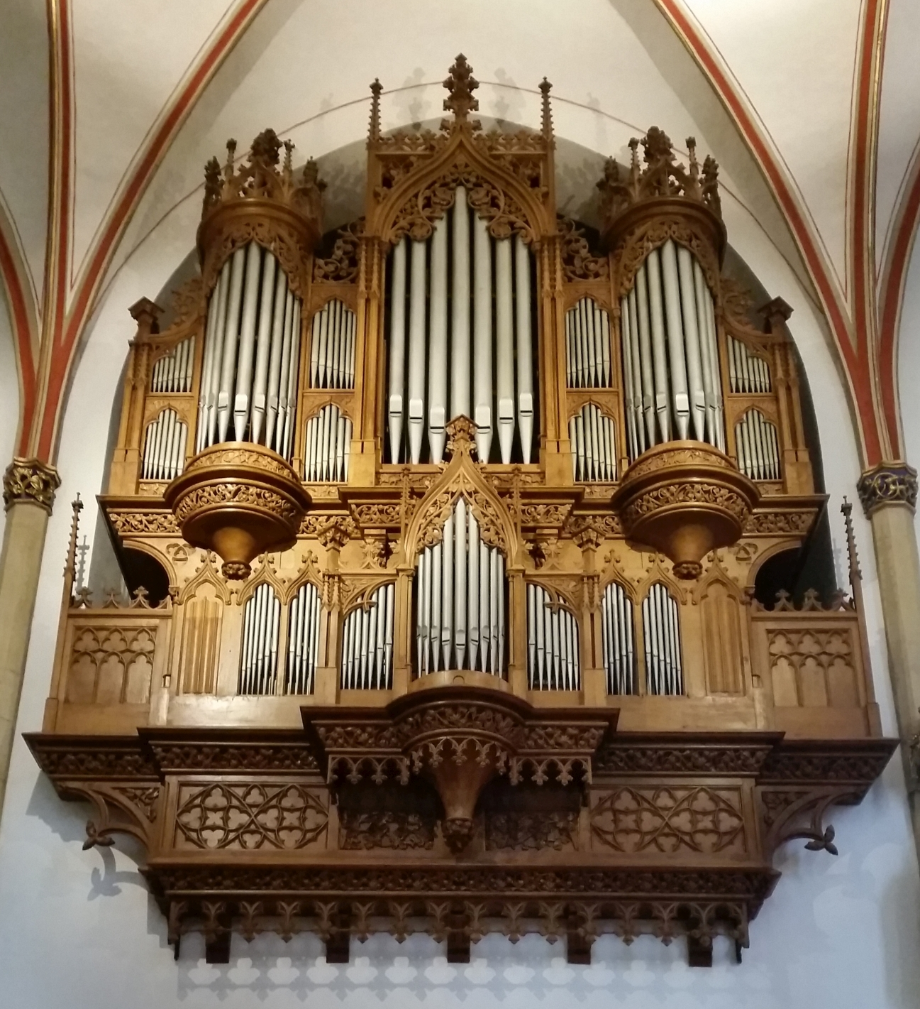 Prospekt der Führer-Orgel in St. Felizitas, 59348 Lüdinghausen. Das neugotische Orgelgehäuse, das 1873/74 von der Werkstatt Josef Laudenbach in Dülmen erbaut wurde, gehört zu den wertvollsten seiner Zeit im nördlichen Westfalen.